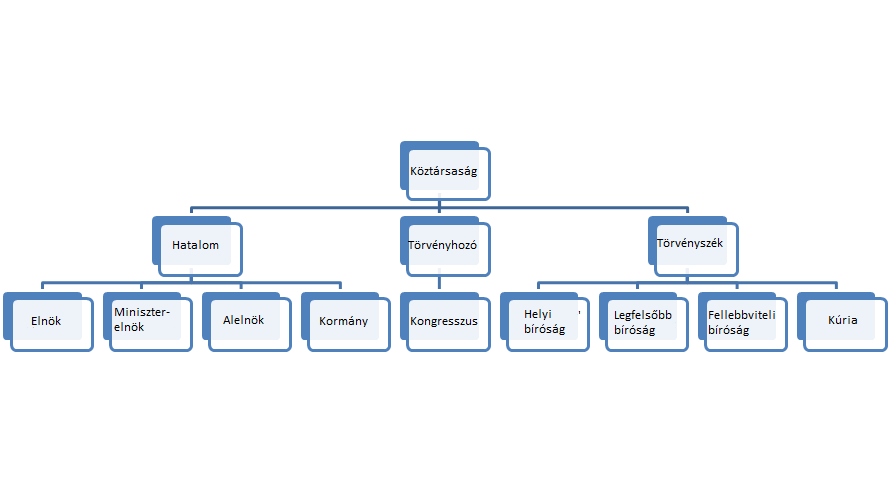 Az ugandai közigazgatás felépítése